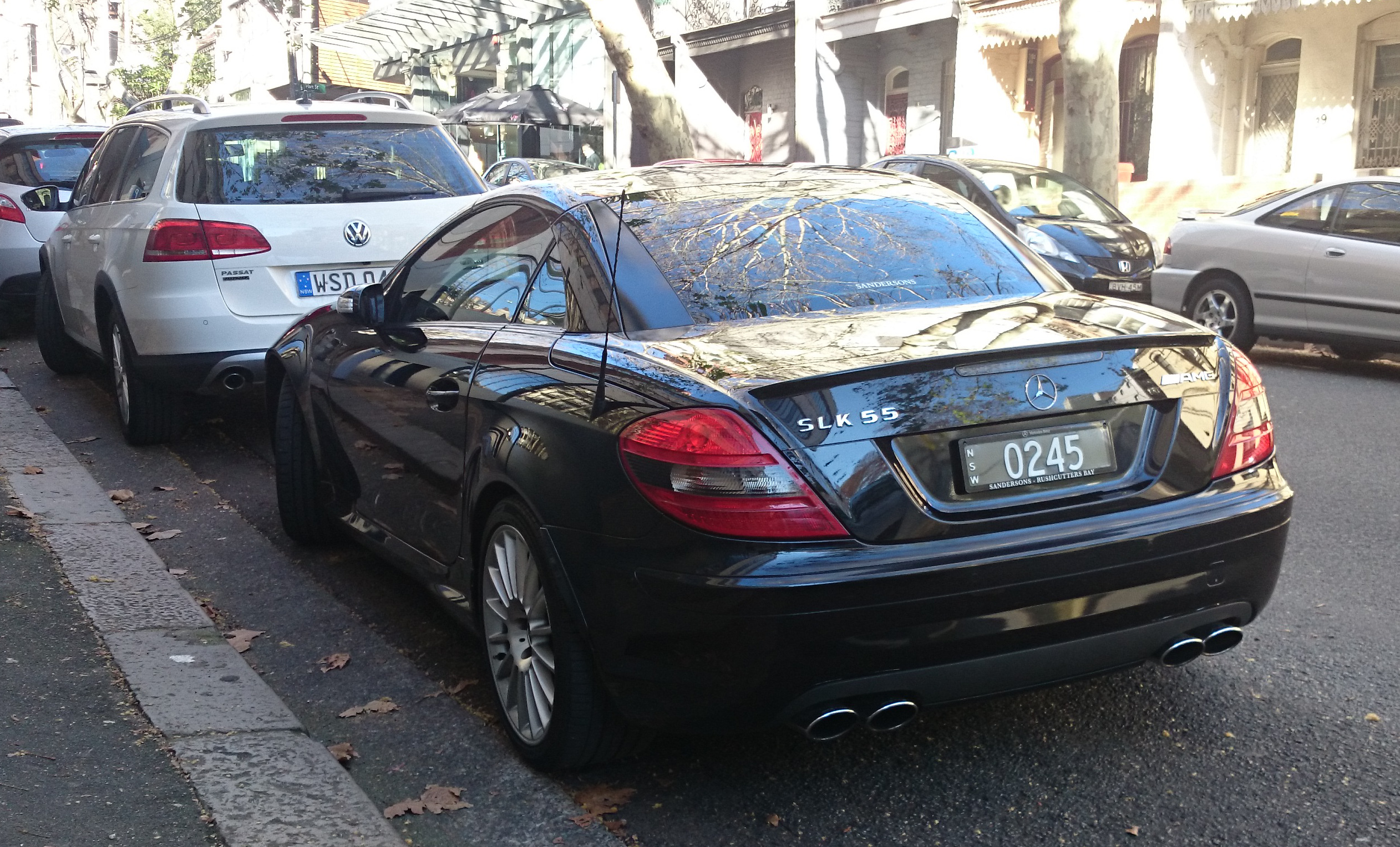 Mercedes-Benz SLK55 AMG